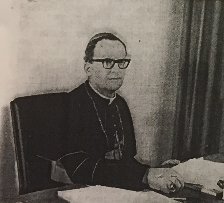 Il vescovo di Bolzano-Bressanone mons. Joseph Gargitter durante l'inaugurazione delle trasmissioni televisive in lingua tedesca della RAI Radiotelevisione Italiana